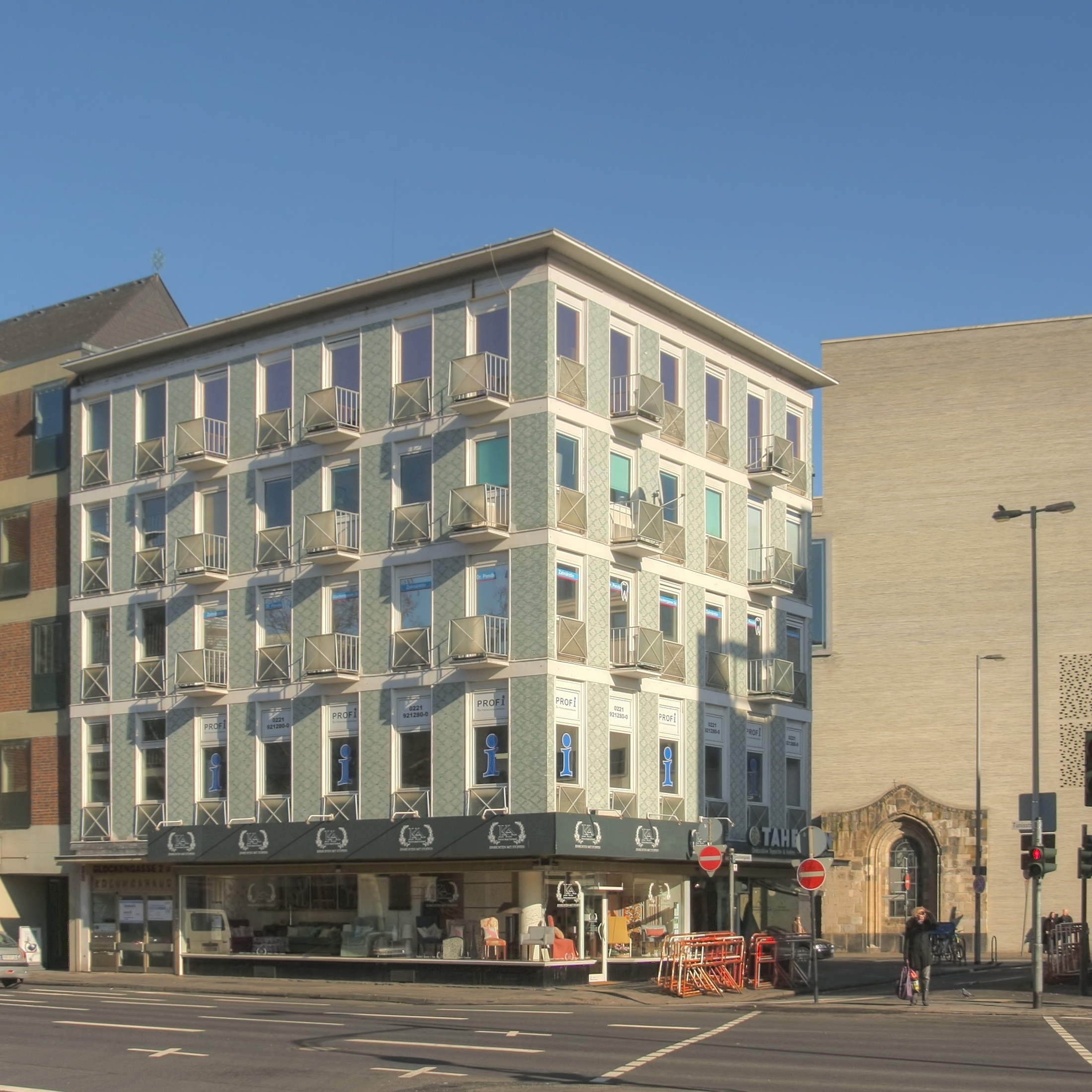 Wohn- und Geschäftshaus „Kolumbahaus“. Architekt: Wilhelm Koep, Baujahr: 1958